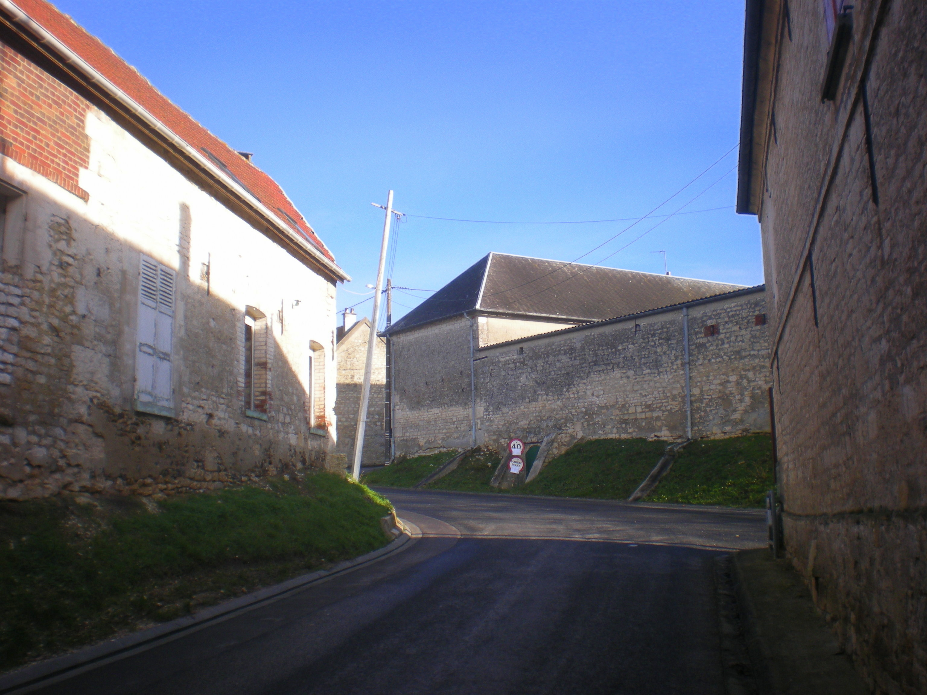 L'entrée dans le village de Maimbeville (Oise) de la D532.